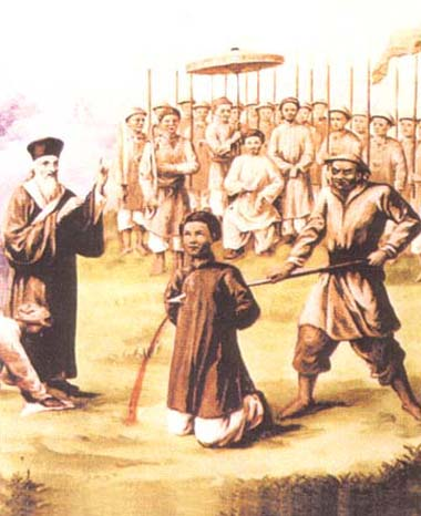 Andrew of Phu Yen - martyr of Vietnam.